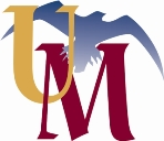 logotipo de la Universidad del Magdalena